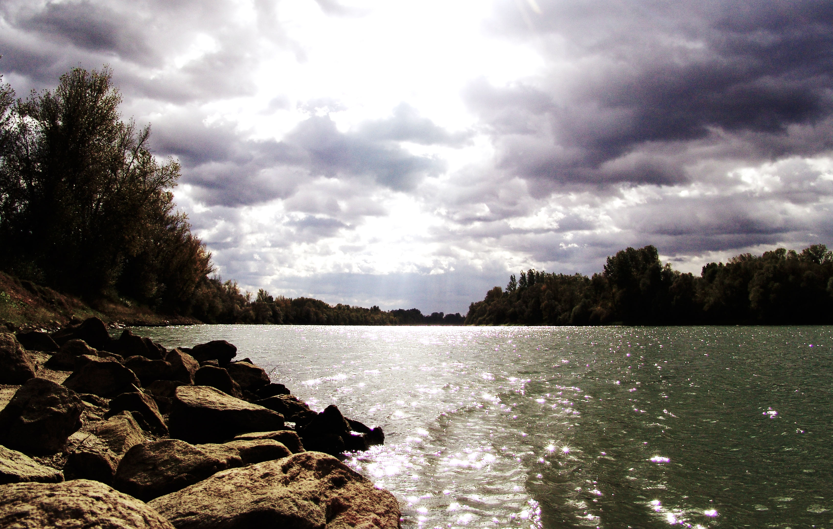 Sava